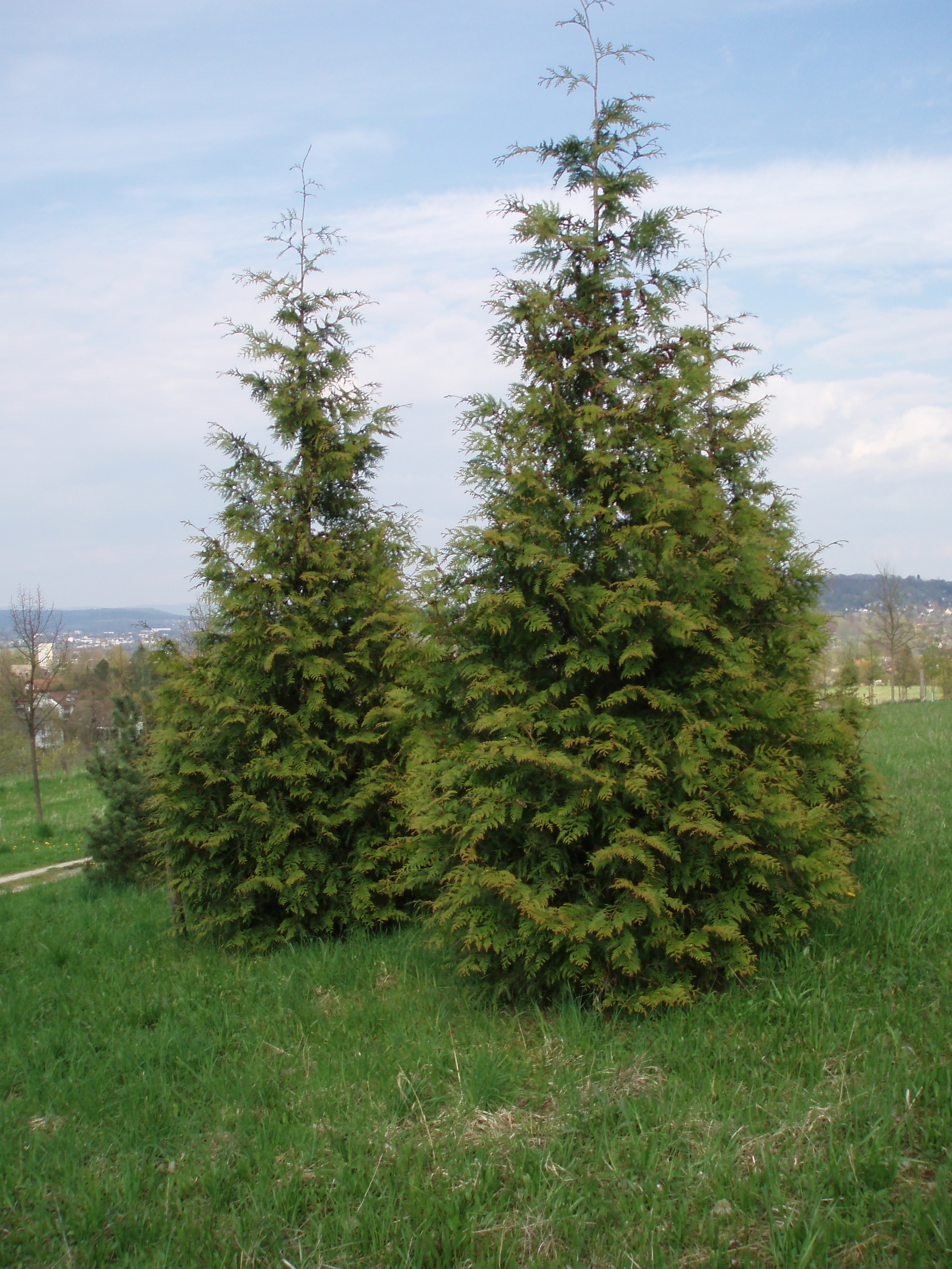 Grünes Labor Coburg, Dreierpflanzung der Riesen-Thuja (Thuja plicata 'Excelsa')